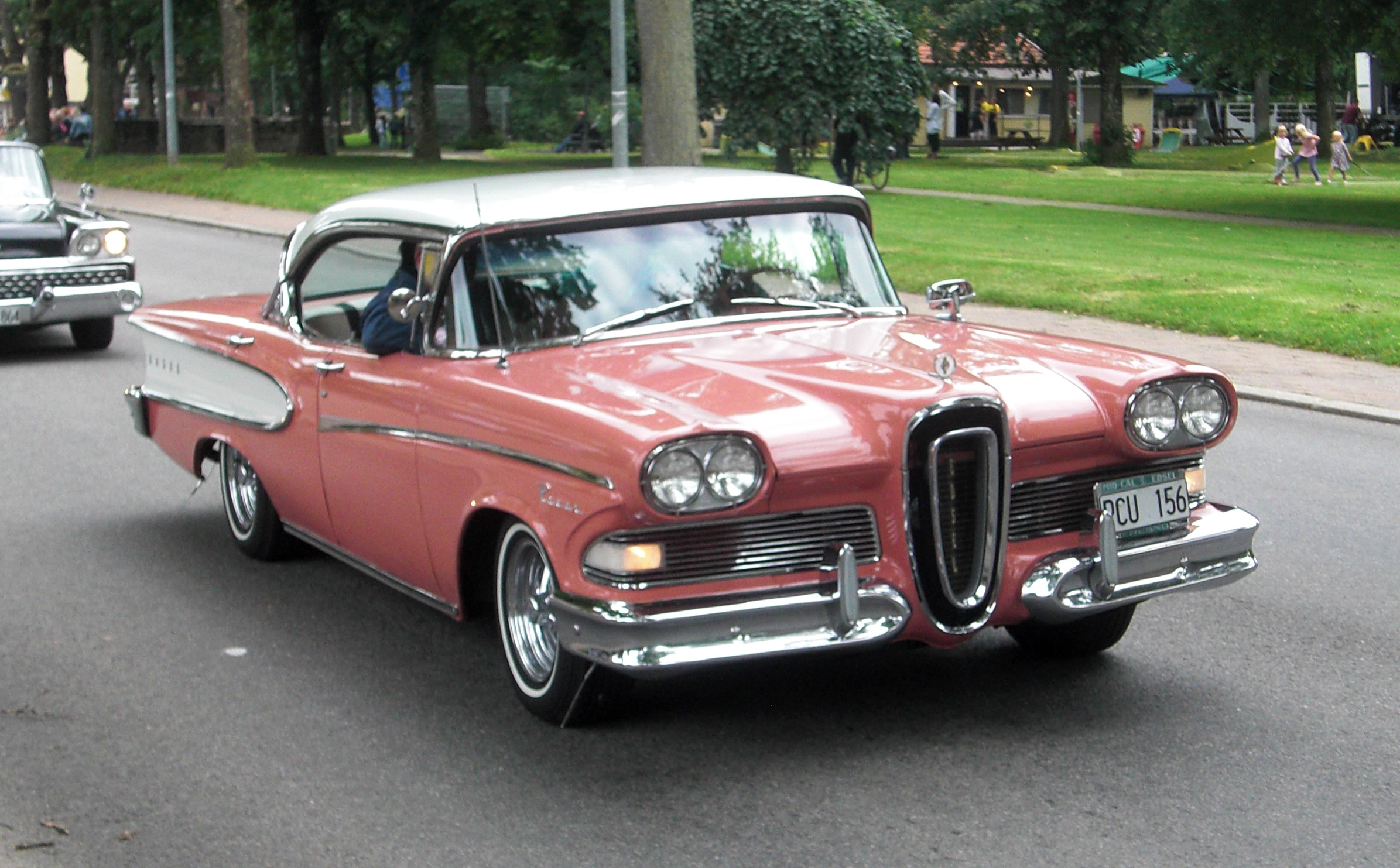 En Edsel Pacer 1958 på cruising på Ströget (Sankt Olofsgatan) i Falköping 2010-07-31.